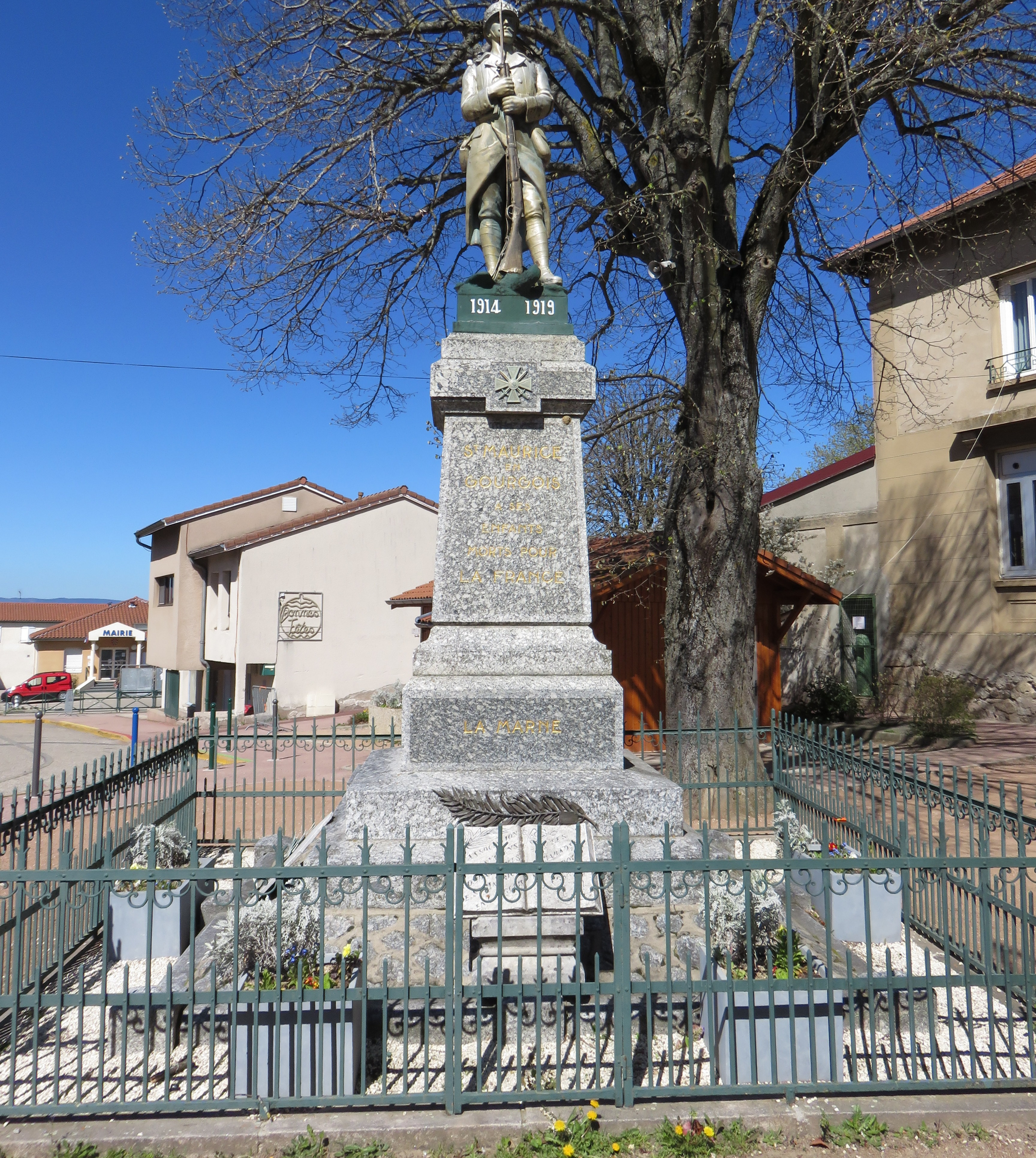 Monument aux morts de Saint-Maurice-en-Gourgois (Loire, France).